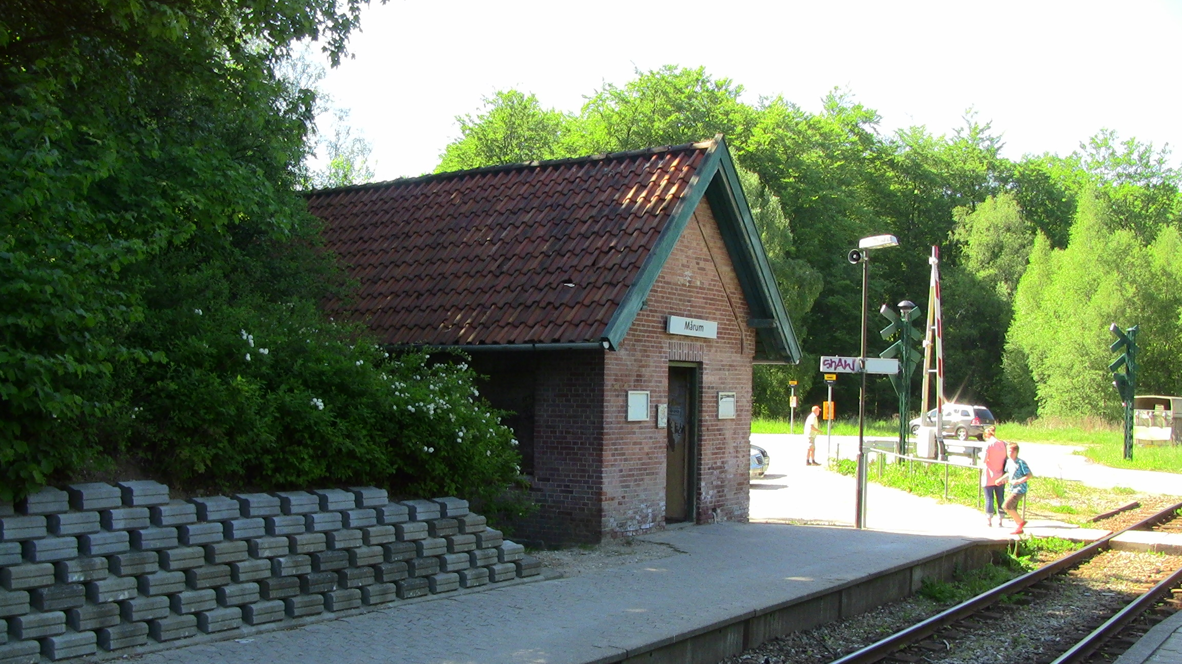 Mårum Station on Gribskovbanen, Denmark.